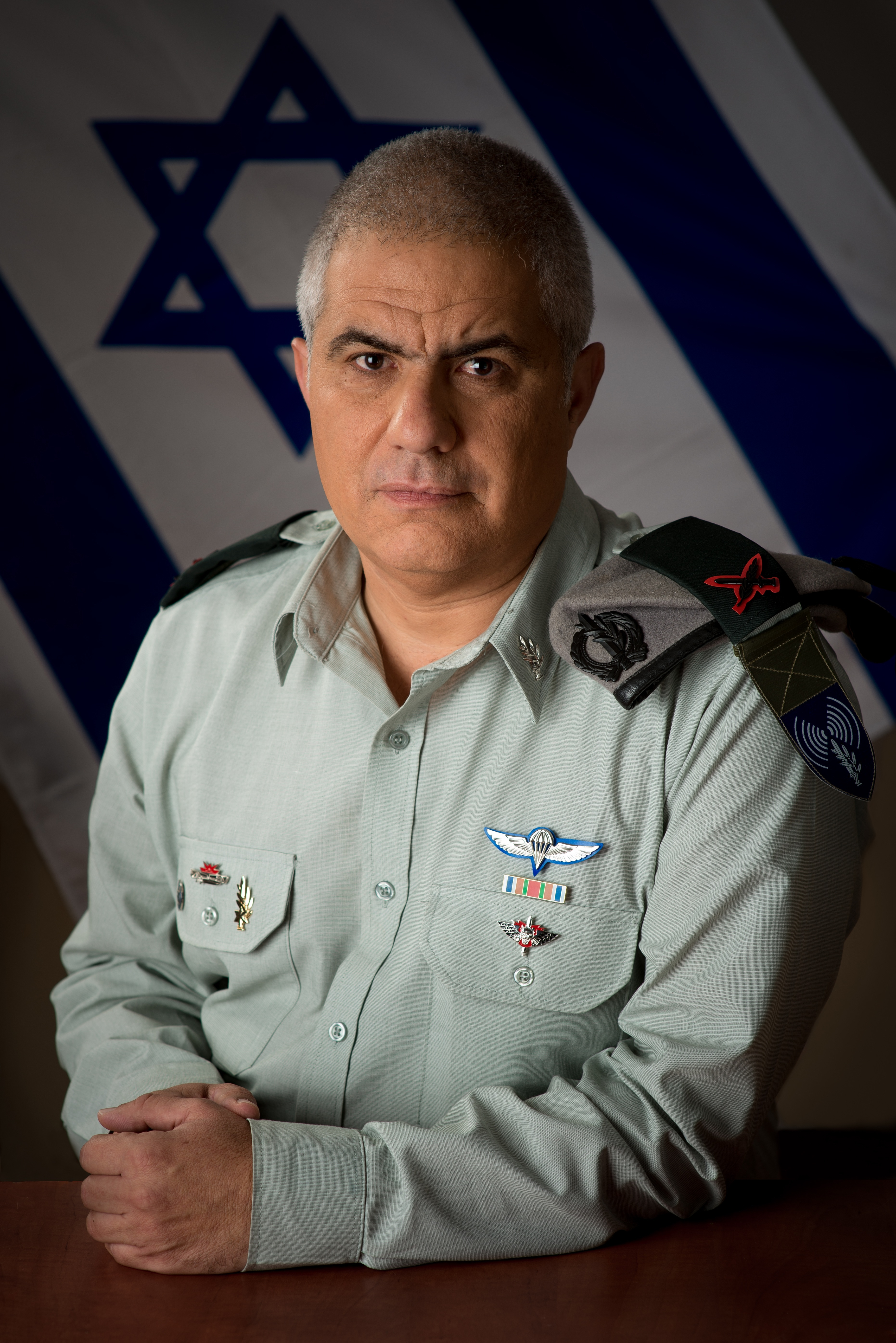 דובר צה"ל מוטי אלמוז